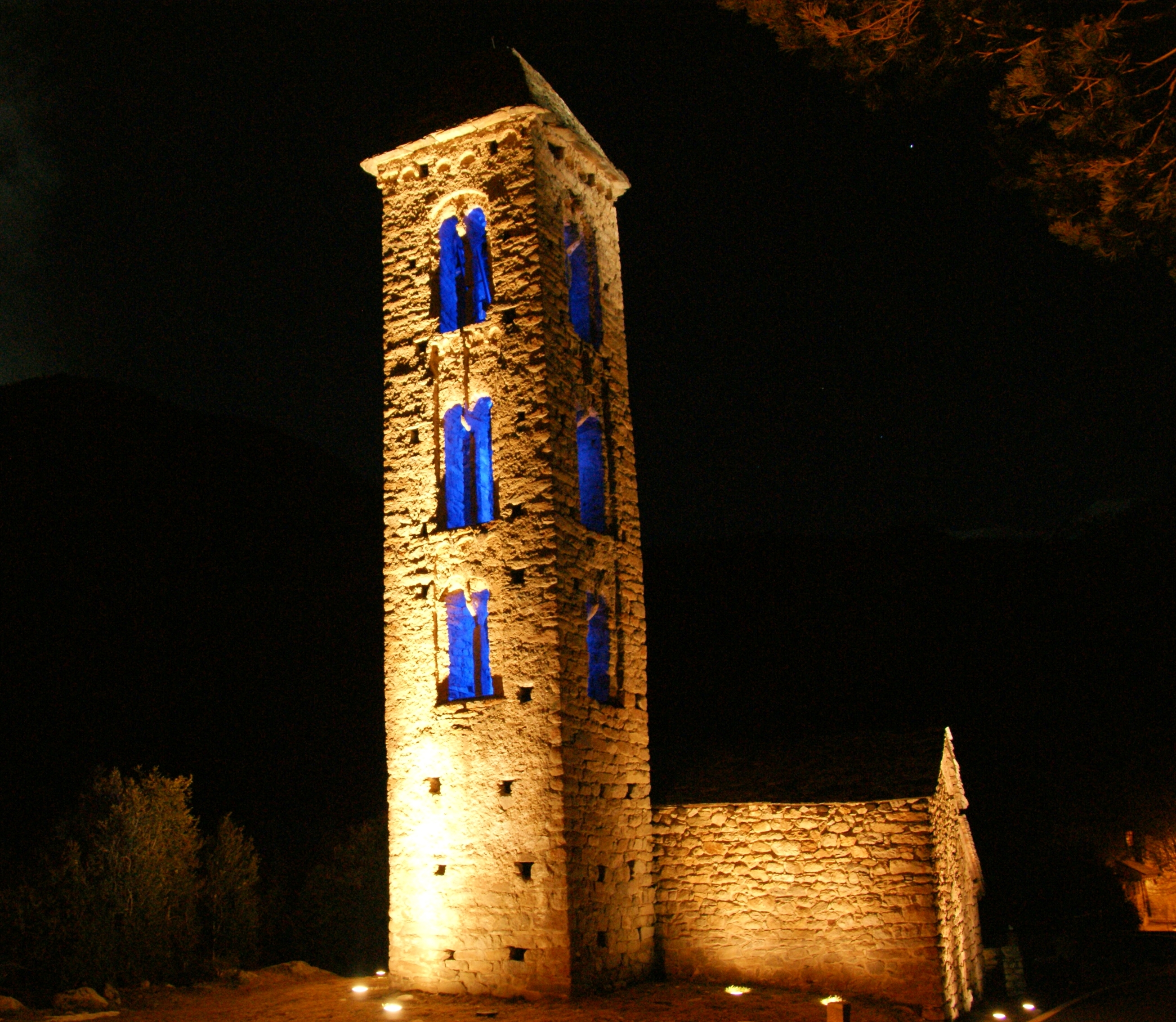 Església de Sant Miquel d'Engolasters